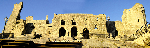 Veduta frontale castello di Cleto